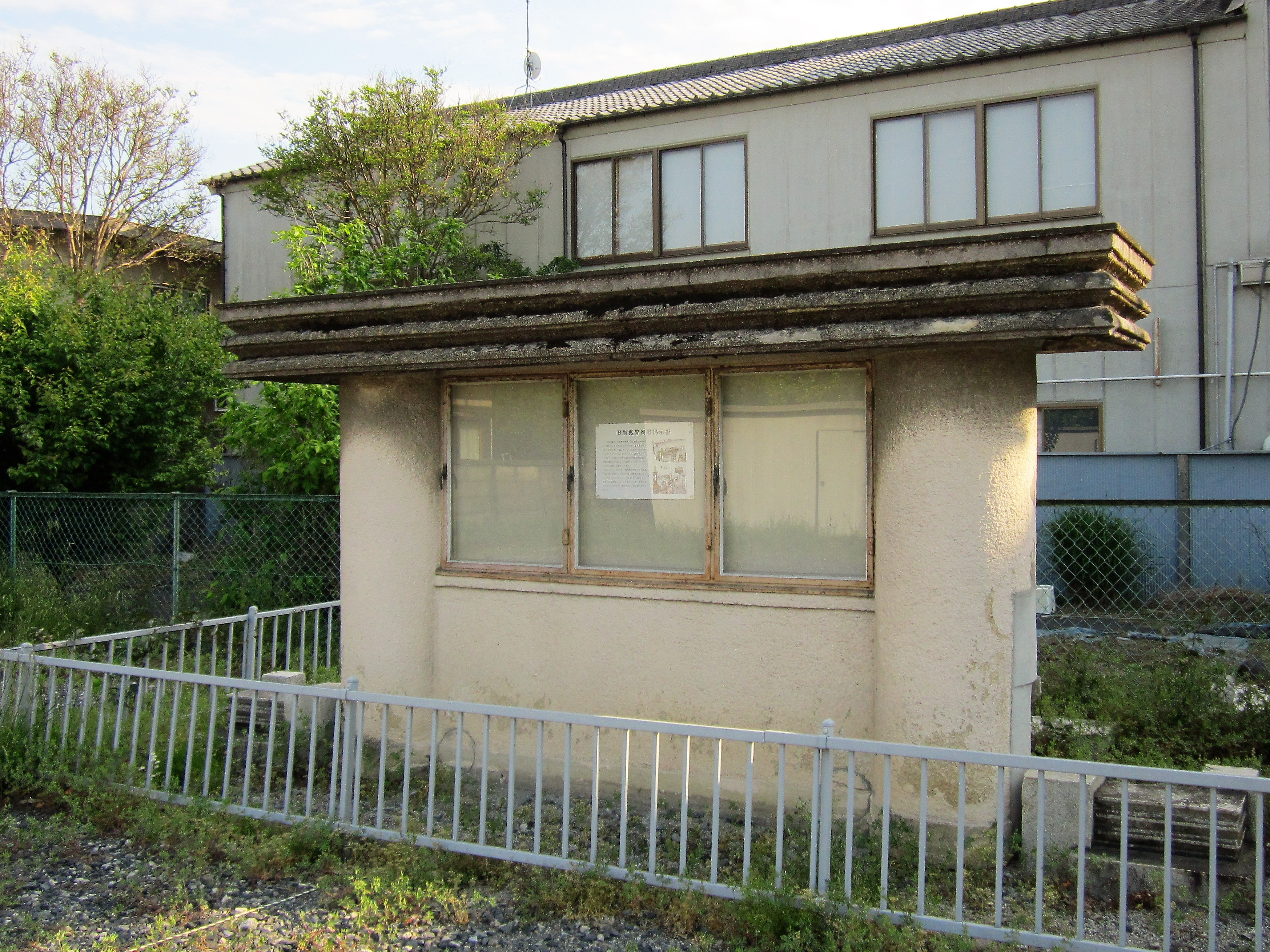 さいたま市立岩槻郷土資料館（旧岩槻警察署附属掲示場、さいたま市岩槻区本町） Canon PowerShot A2200